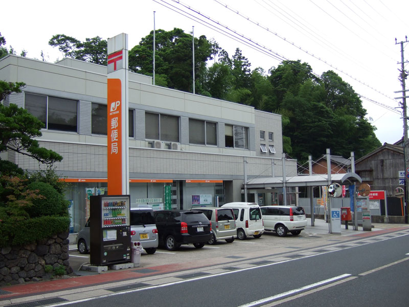 峰山郵便局